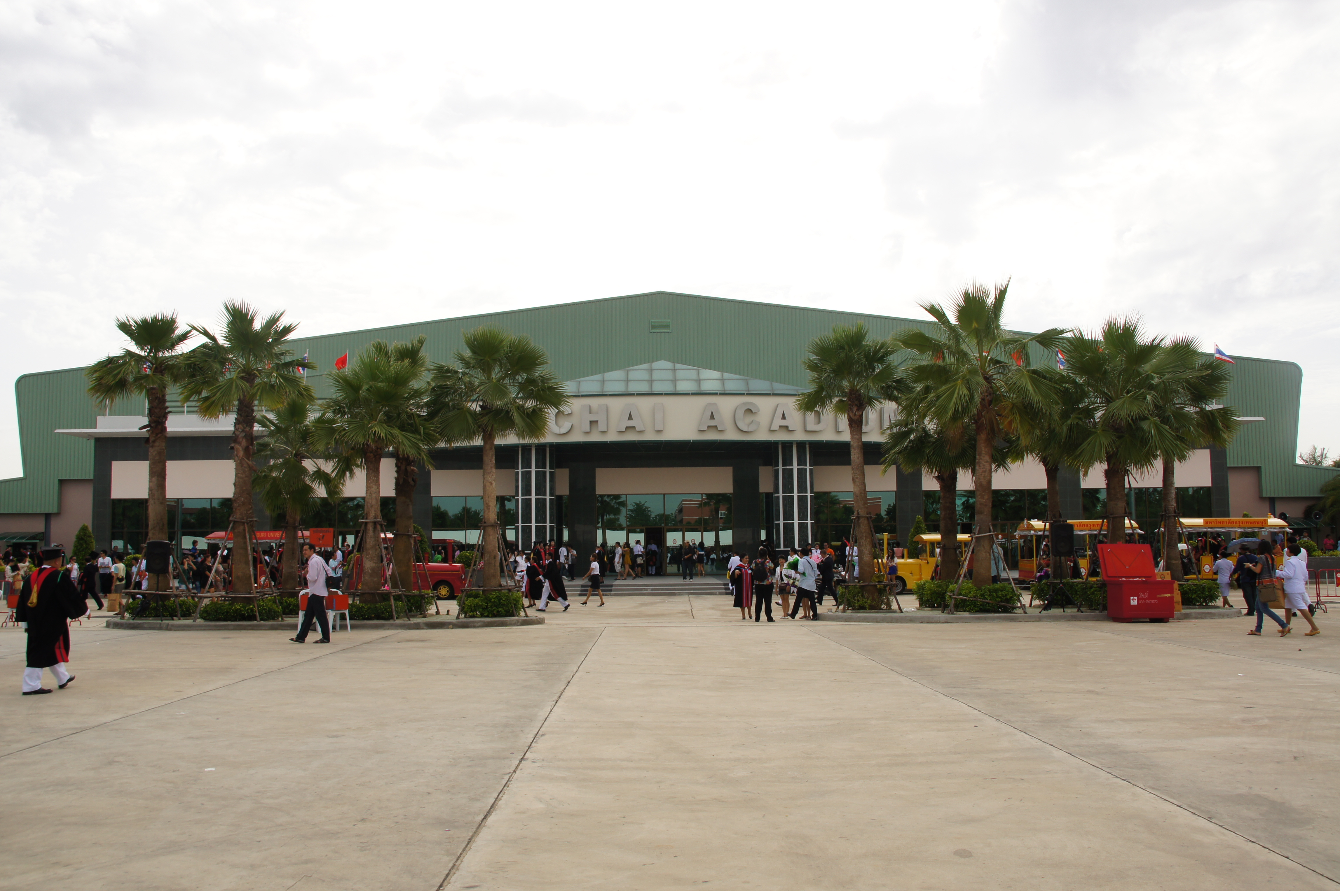 อาคารชาญชัย อเคเดี้ยม มหาวิทยาลัยกรุงเทพธนบุรี